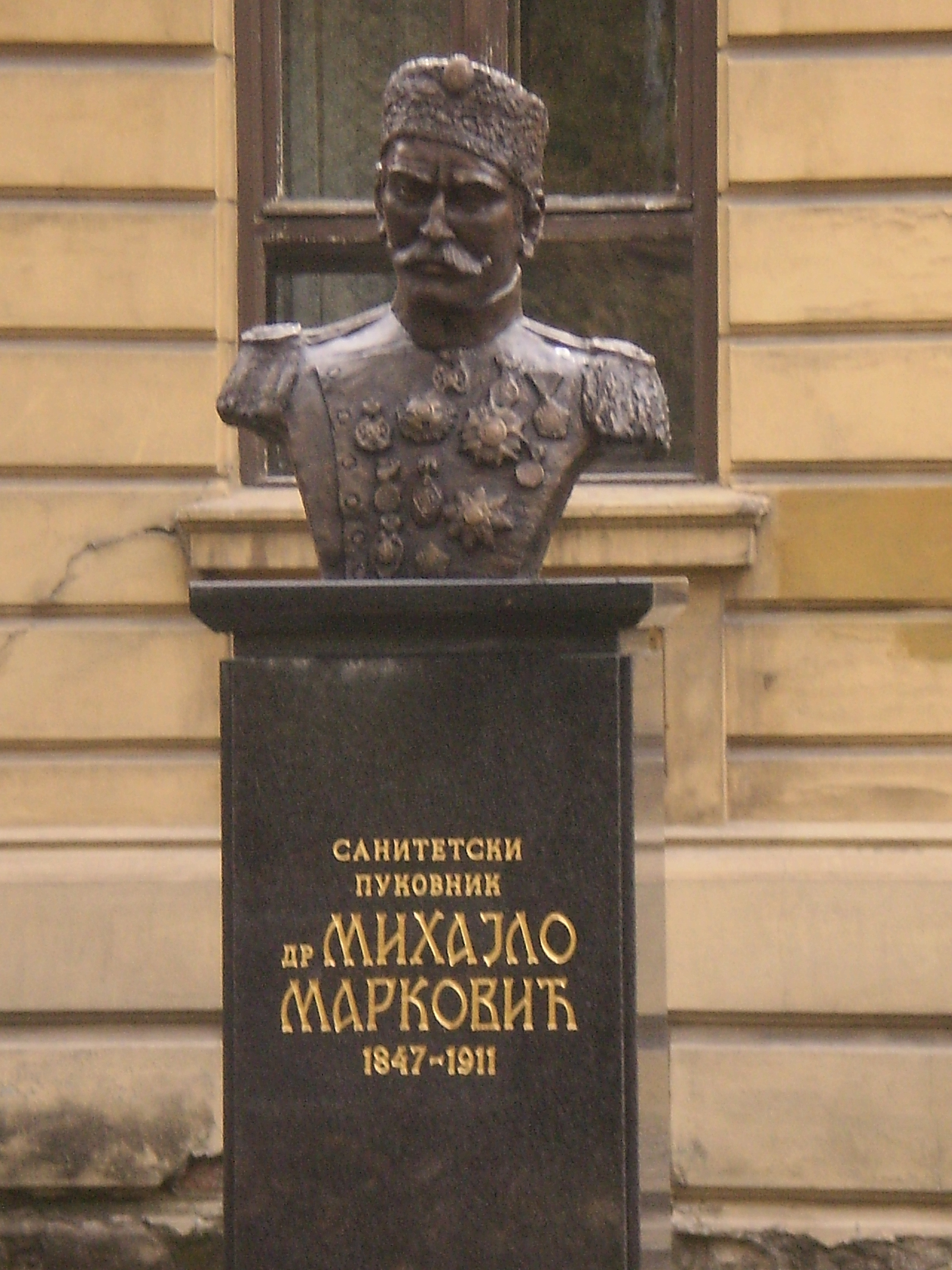 Mihajlo-Mika Marković spomen bista velikanu srpske medicine otkrivena septembra 2010. ispred Pasterovog zavoda u Nišu, (na 110. godišnjicu zavoda). Autor MileMD, 17/10/2010.